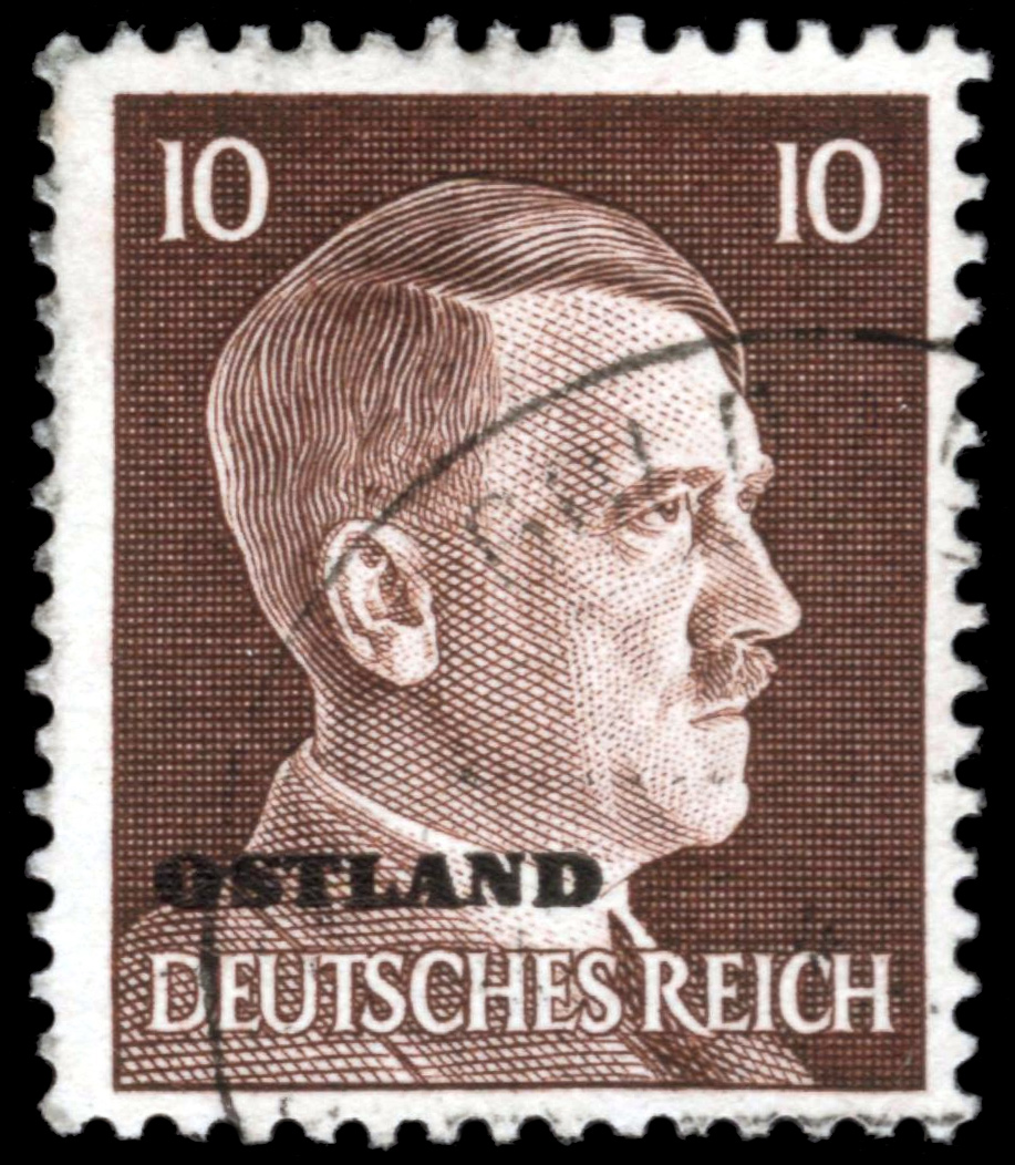 Немецкая почтовая марка времён ВОВ для восточных оккупированных территорий ("Остланд") номиналом 10 пф (0,1 рейхсмарки) с портретом Гитлера. Надпечатка Остланд